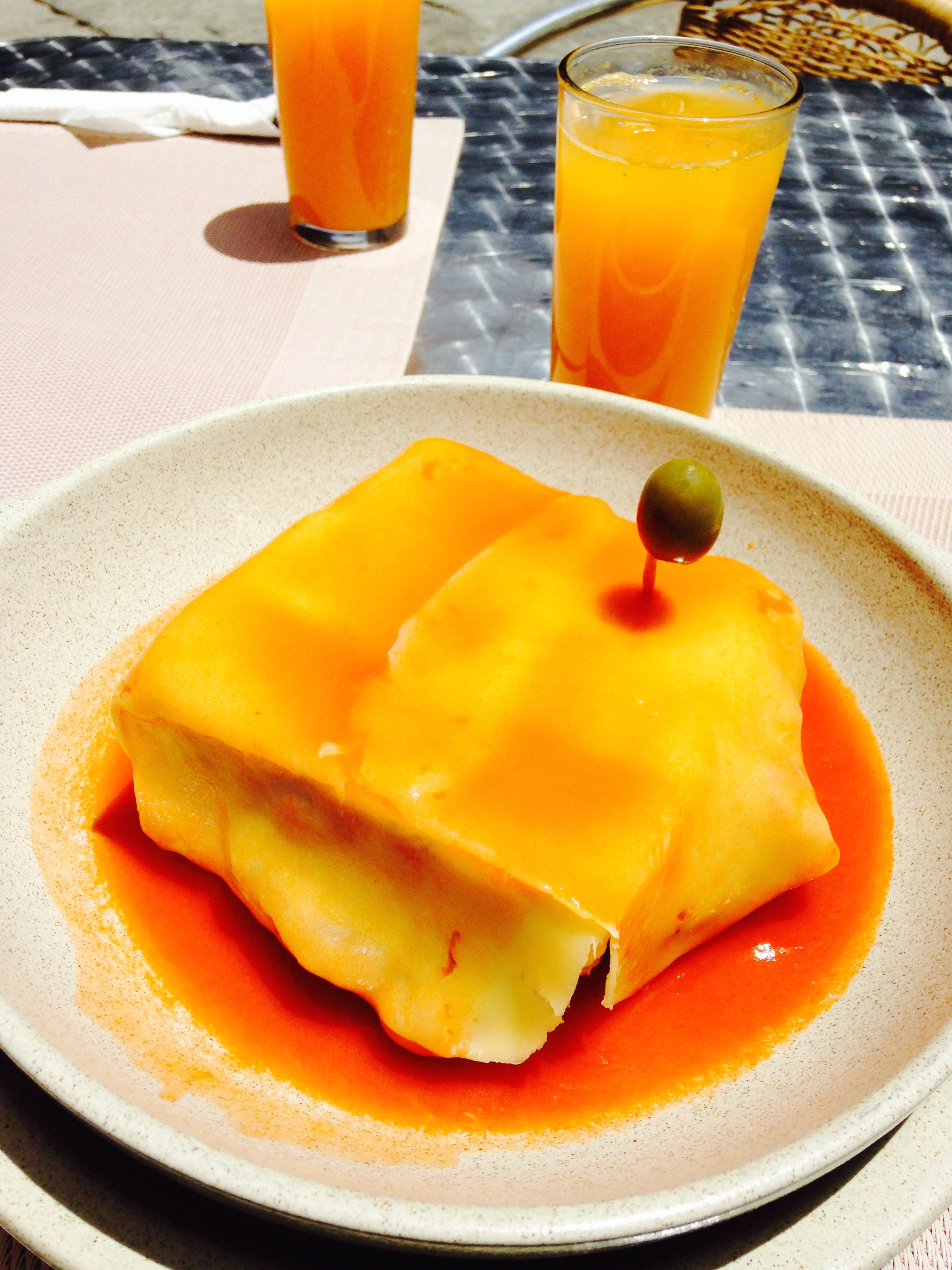 Francesinha